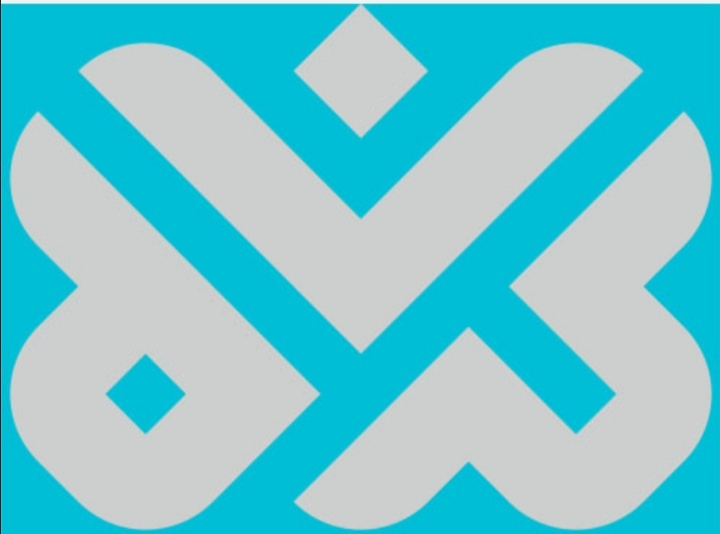 لوگوی شبکه کرمان که در تاریخ ۲۹ دسامبر ۲۰۱۹ تغییر کرد.